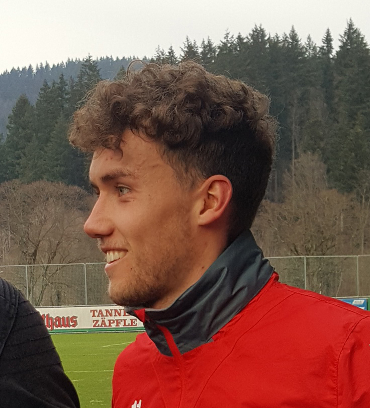 Luca Waldschmidt nach dem SC Freiburg-Training am 4. Januar 2019